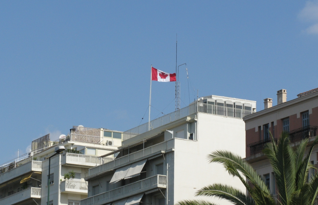 Πρεσβεία Καναδά στην Αθήνα